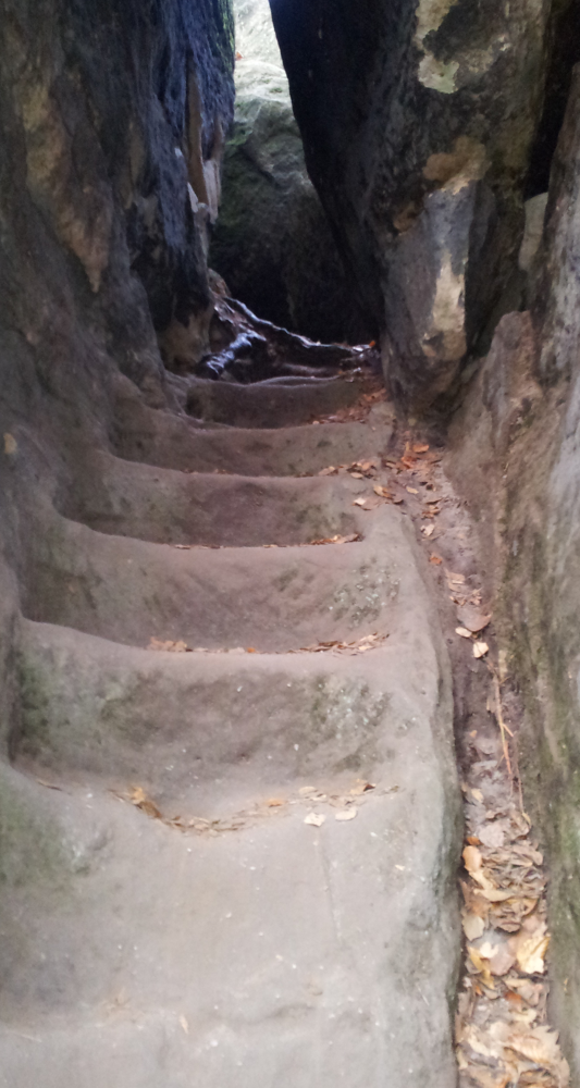 Burg Arnstein (Sachsen) – Aufgang zur Burg